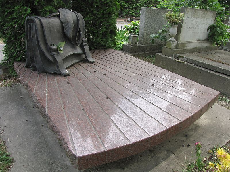 Timár József, eredetileg: Gerstner József (1902. március 7. Budapest - 1960. október 3. Budapest) színész sírja Budapesten. Farkasréti temető: 8/3-1-13/14. [Szobrász: Kampfl József].